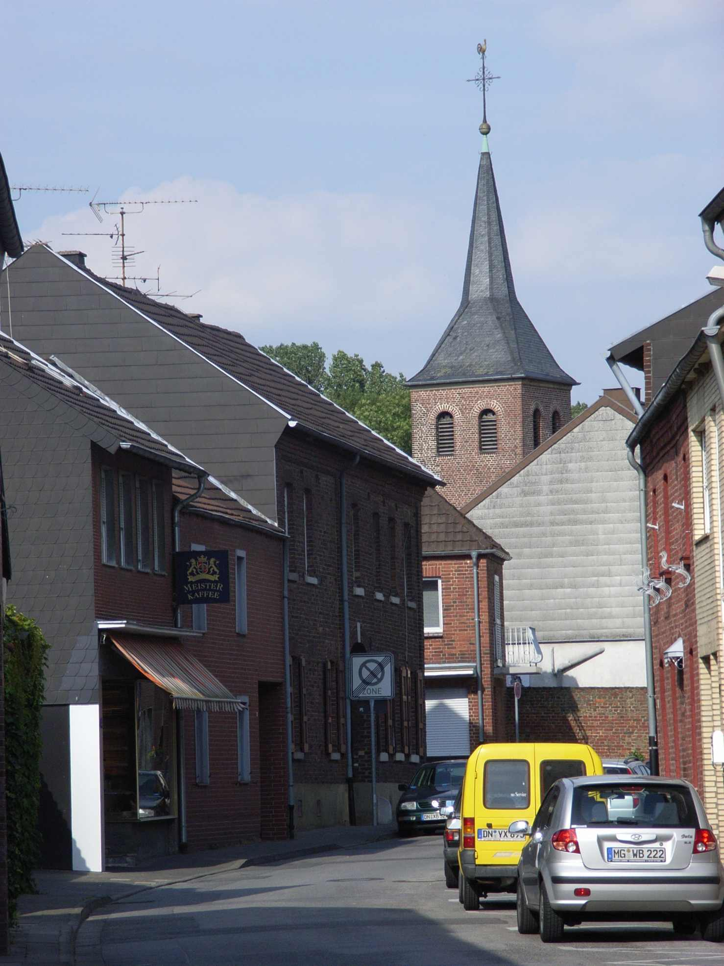 Linnich-Tetz